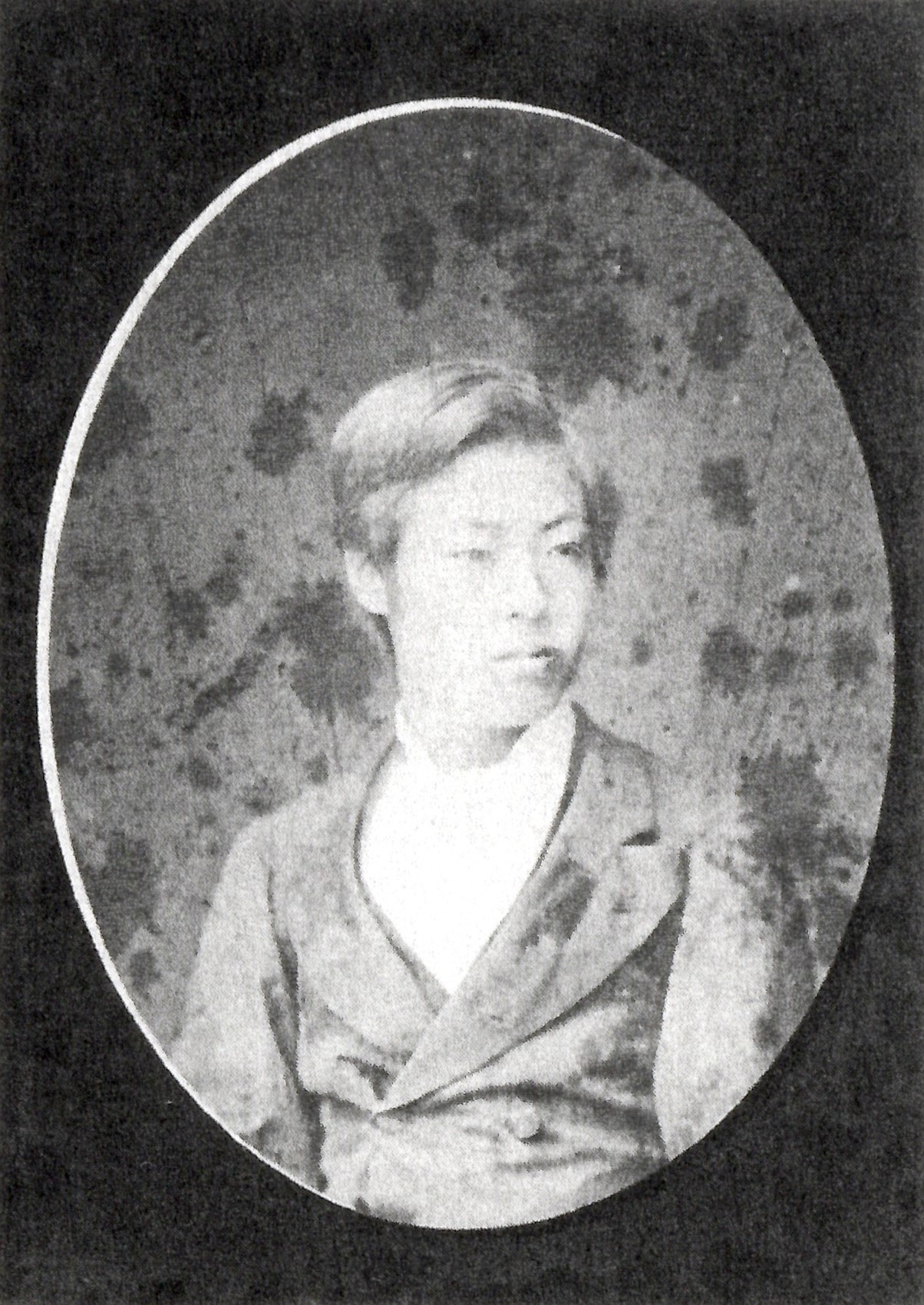 分部光謙の肖像写真。